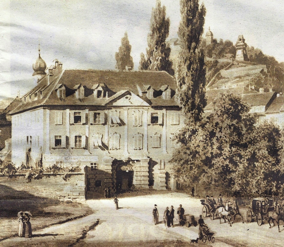 Das Neutor in Graz; Bild entstanden vor 1883/84.